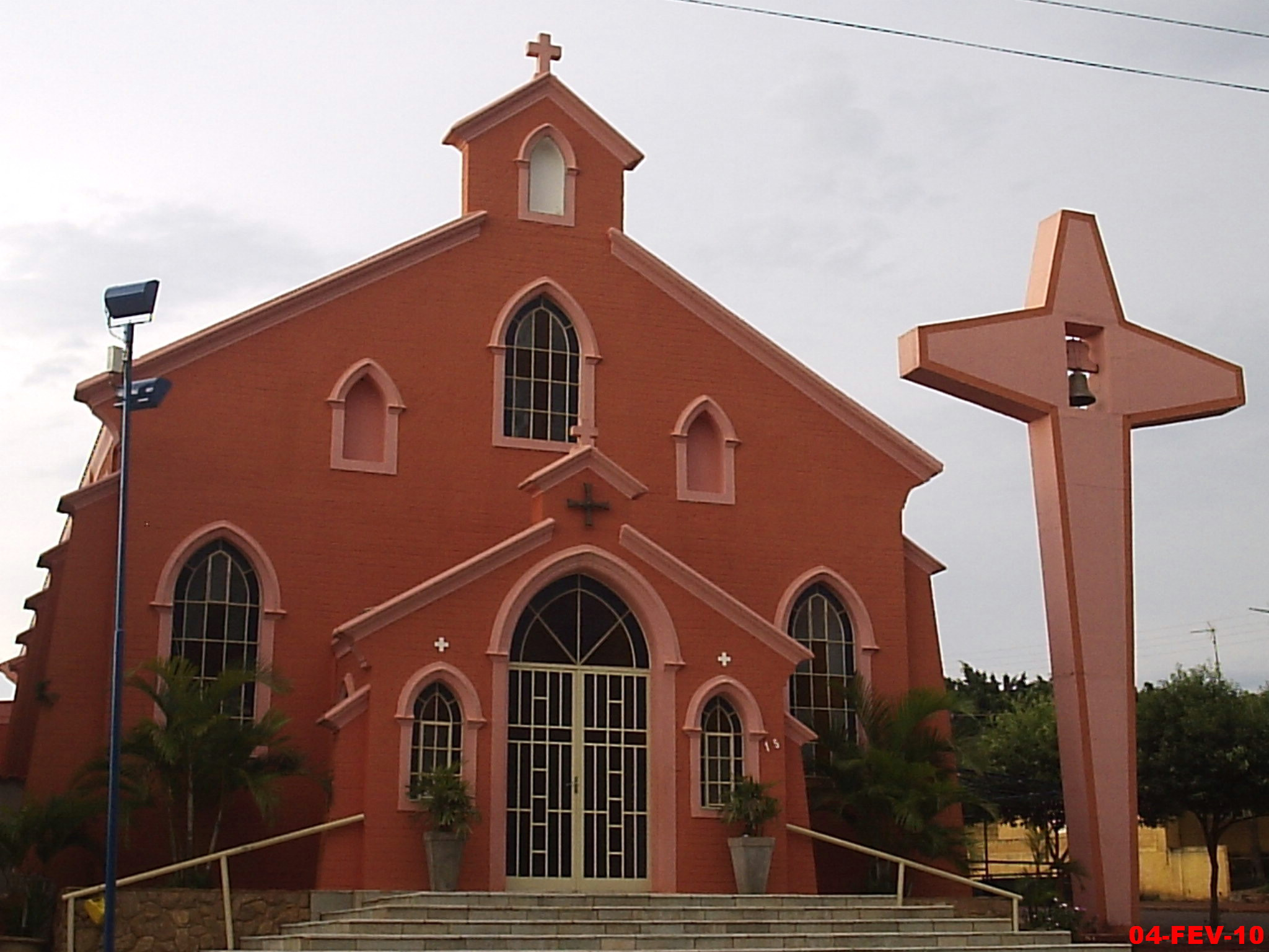 Igreja de Dumont